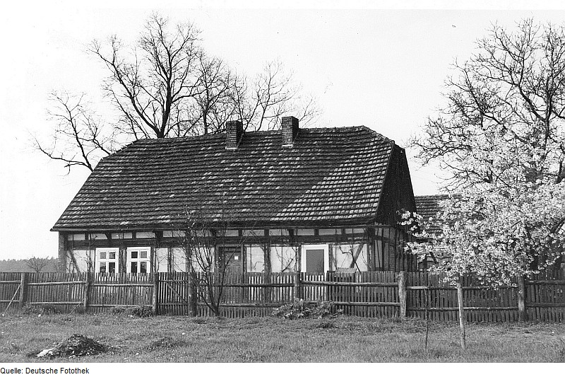 Original image description from the Deutsche Fotothek Baruth/Mark-Merzdorf. Windmühlenhaus